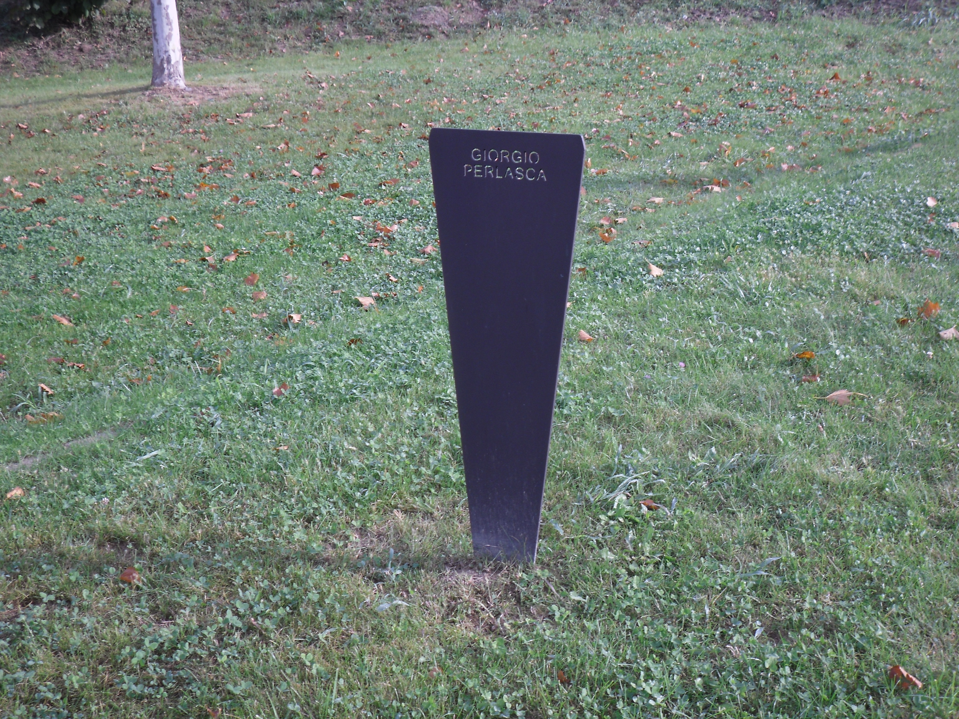 Giardino dei Giusti del Mondo di Padova. Stele dedicata a Giorgio Perlasca.